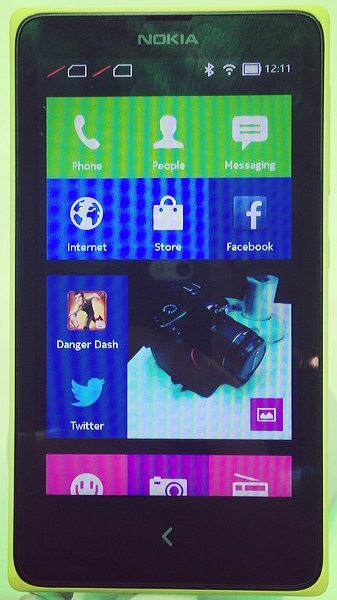 Uploaded via Instagram ift.tt/1dosVSG